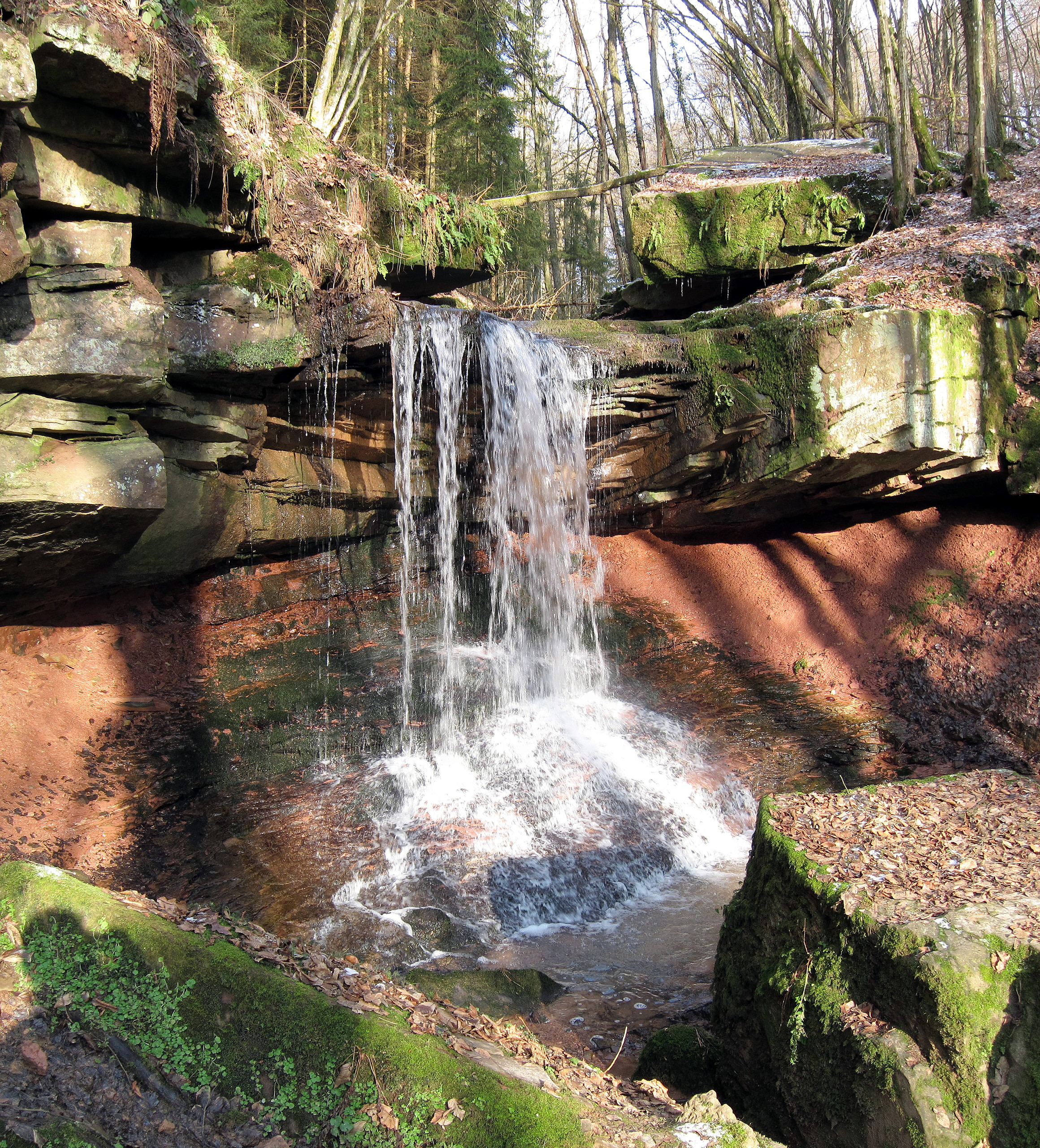 Tretstein Wasserfall, ein kleiner Wasserfall zwischen Wartmannsroth und Gräfendorf im südlichsten Teil der bayerischen Rhön. Der etwa drei Meter hoch freifallende Wasserfall ist als Naturdenkmal und als Geotop ausgewiesen.